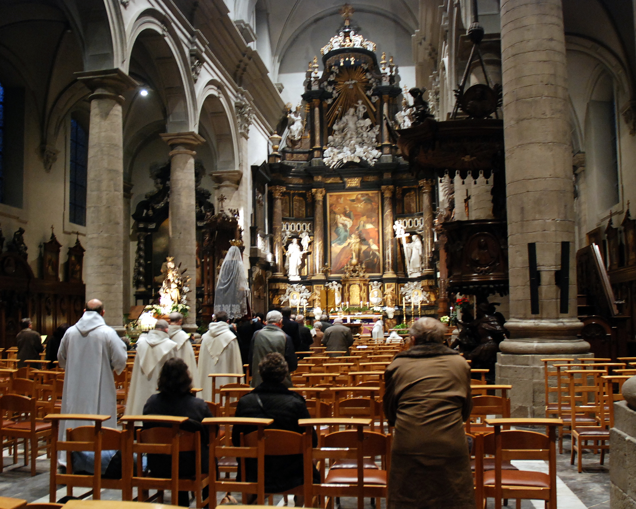 De kloosterkerk van de Paters Karmelieten te Gent, België